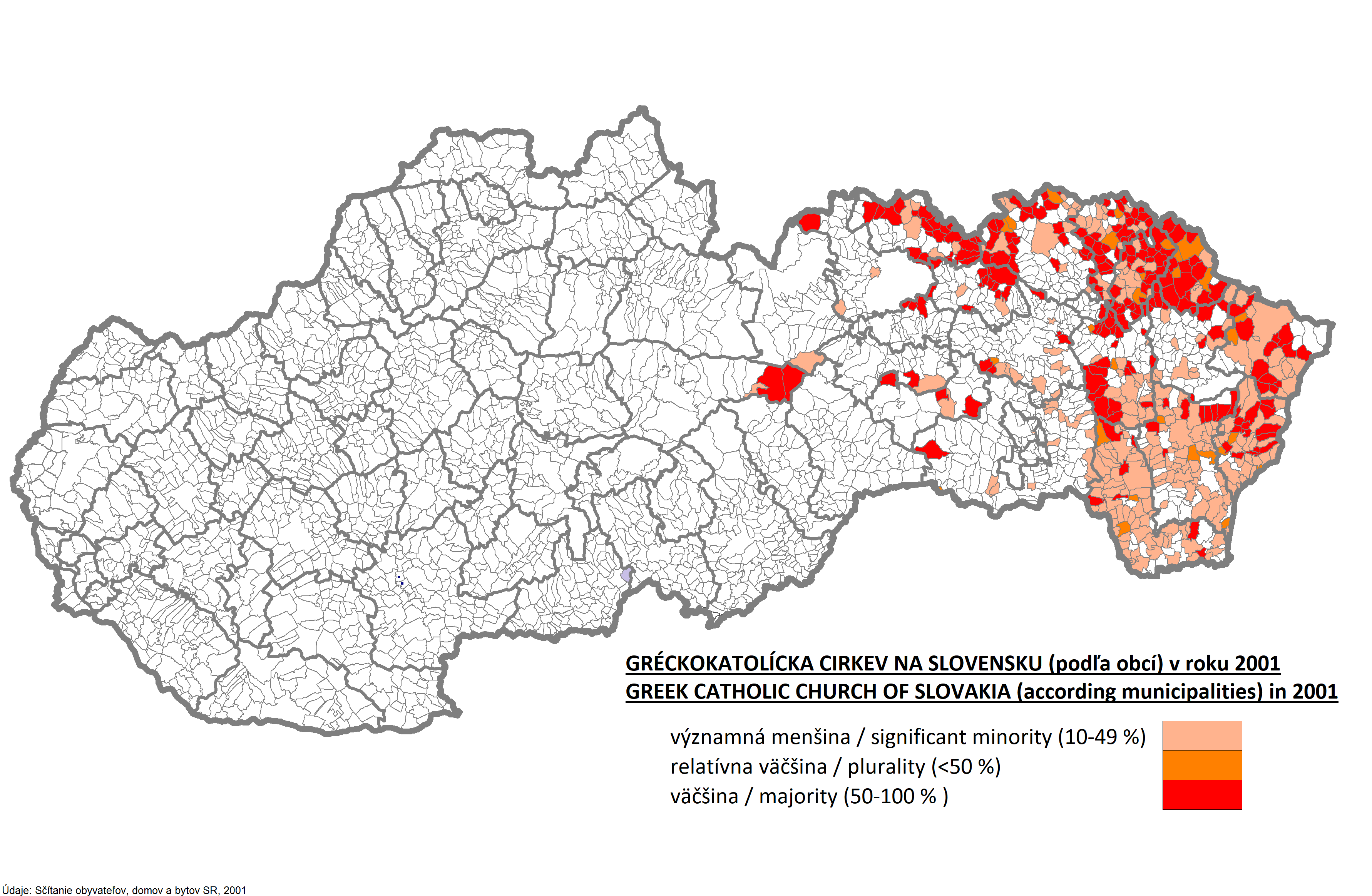 Gréckokatolícka cirkev na Slovensku v roku 2001.